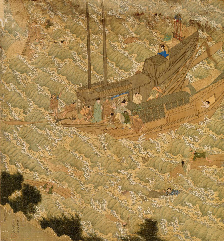 危舟免難，時年三十六